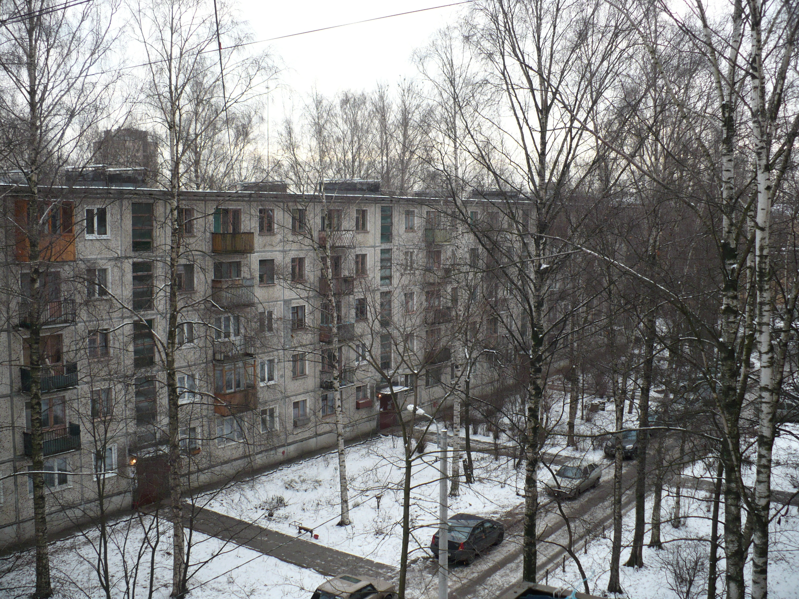 Спальный район, Хрущевки